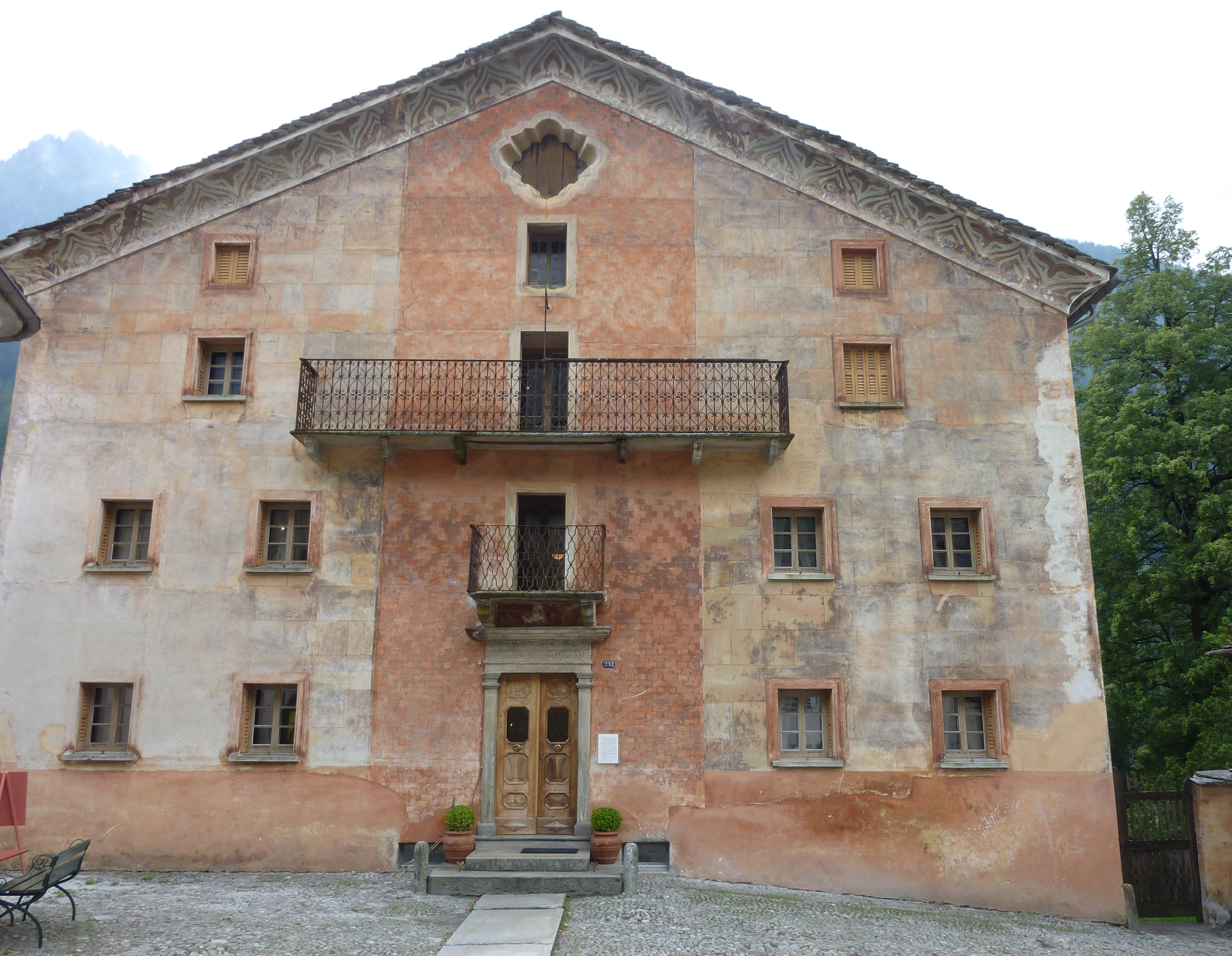 Palazzo Castelmur: Frontseite im Norden